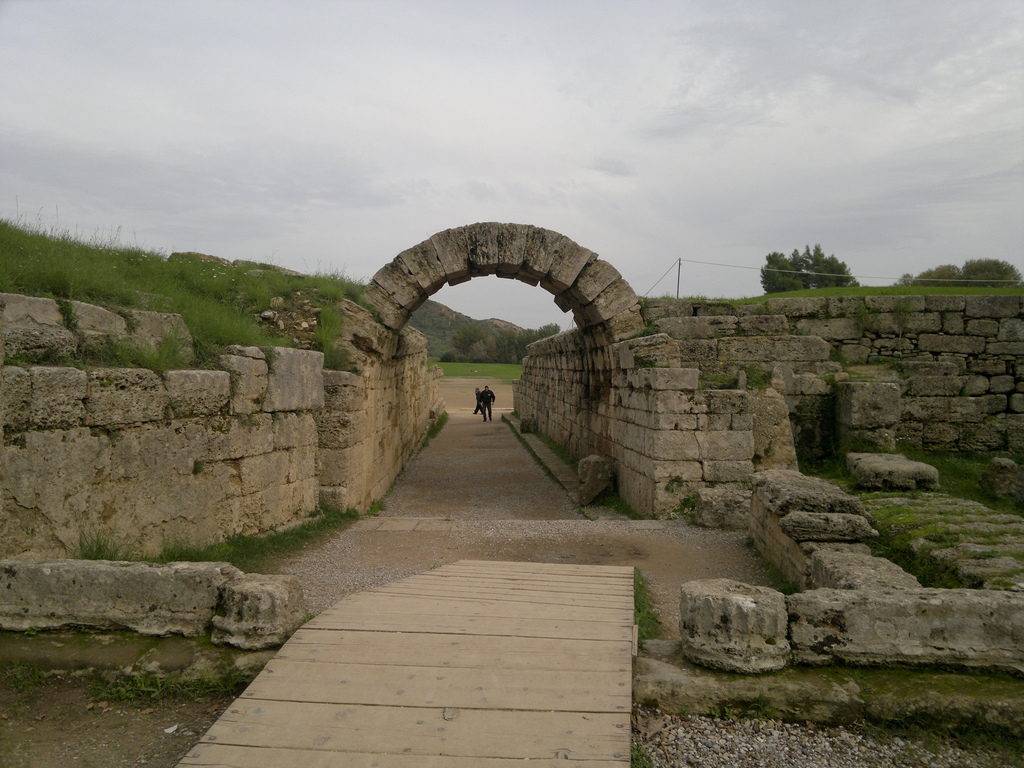 Ancient Olympia, Greece. Photo taken with Nokia N8 (12 Megapixel). Αρχαία Ολυμπία. Φωτογραφία που τράβηξα με το Nokia N8.